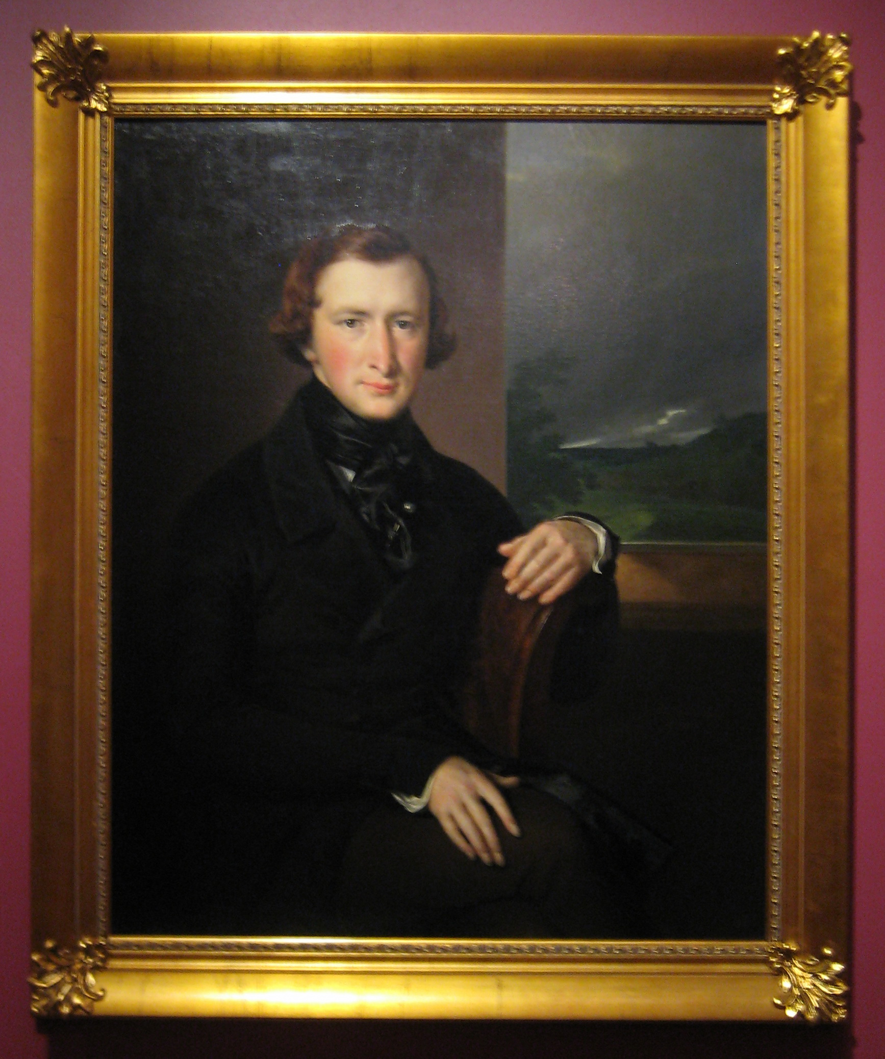 Тропинин Василий Андреевич. Портрет Юрия Федоровича Самарина. 1844